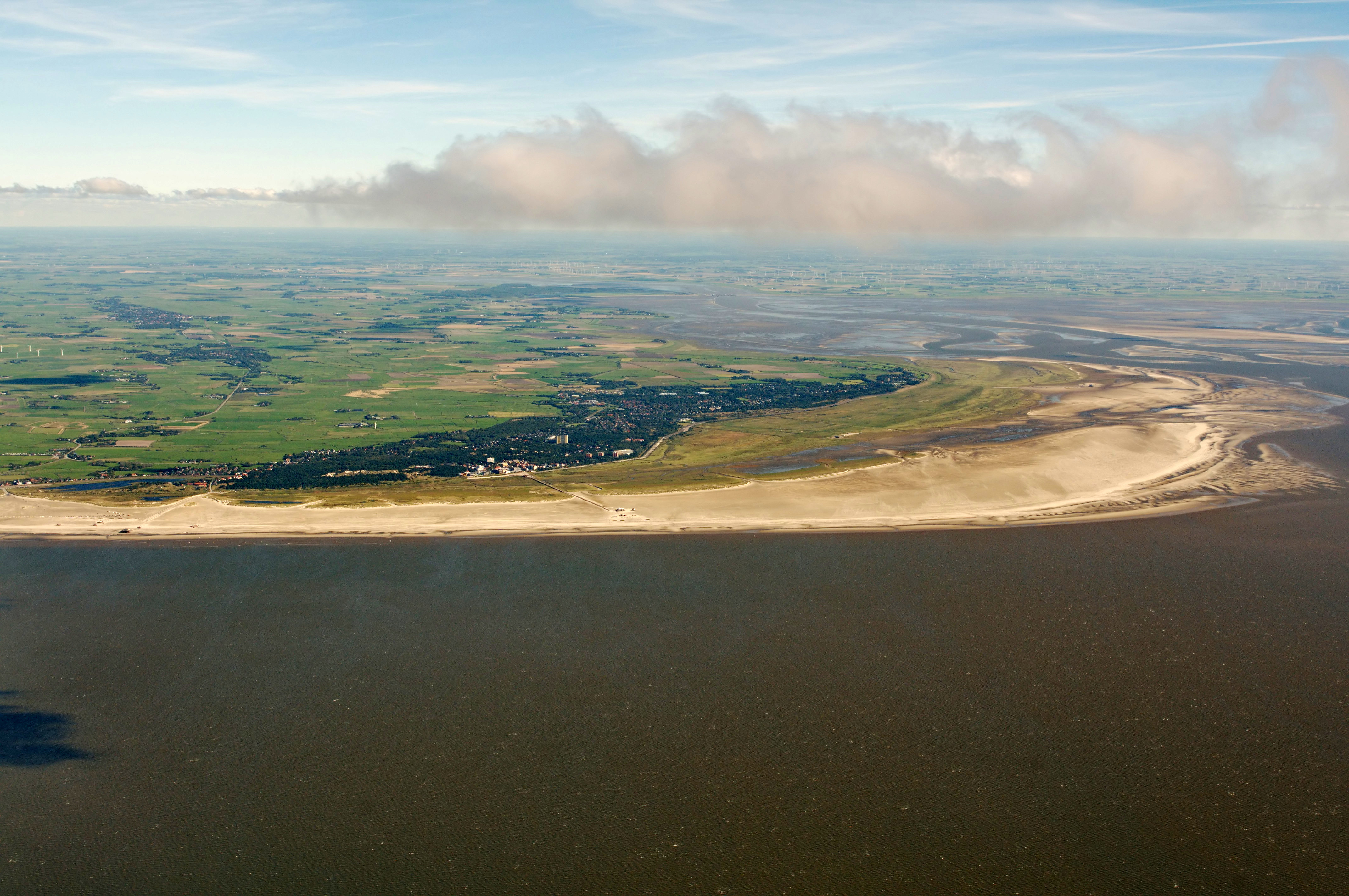 Fotoflug über das nordfriesische Wattenmeer – St. Peter-Ording (von W)